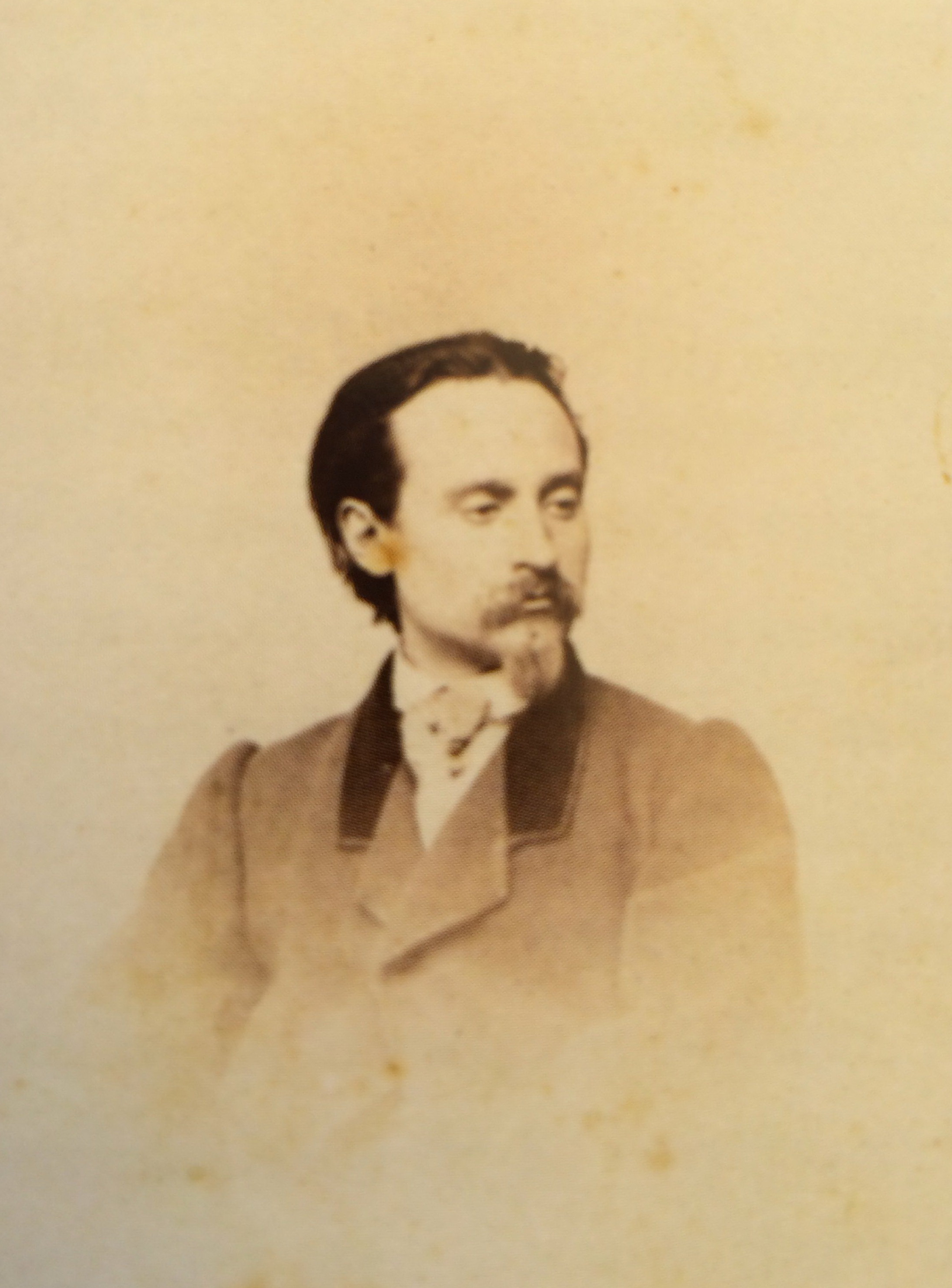 Josep Tapiró i Baró (1836-1913), fotografiat el 1864 a Roma per Gioacchino Altobelli